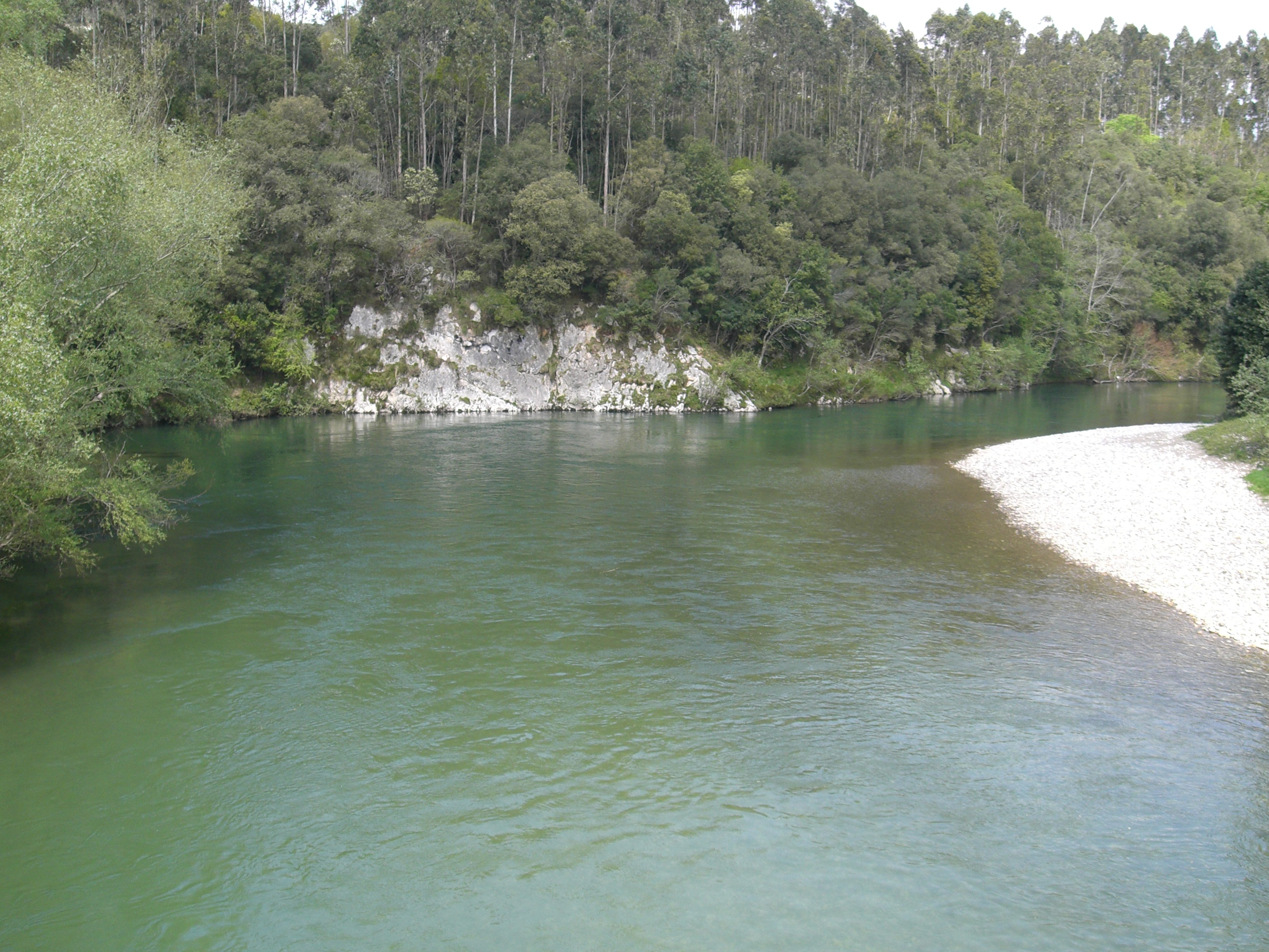 Río DevaCares tras su paso por Panes (Asturias), España.